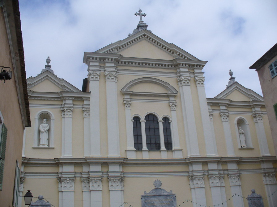 Bastia - Citadelle - PROTOCATHÉDRALE SAINTE-MARIE DE L'ASSOMPTION (XVII cent)